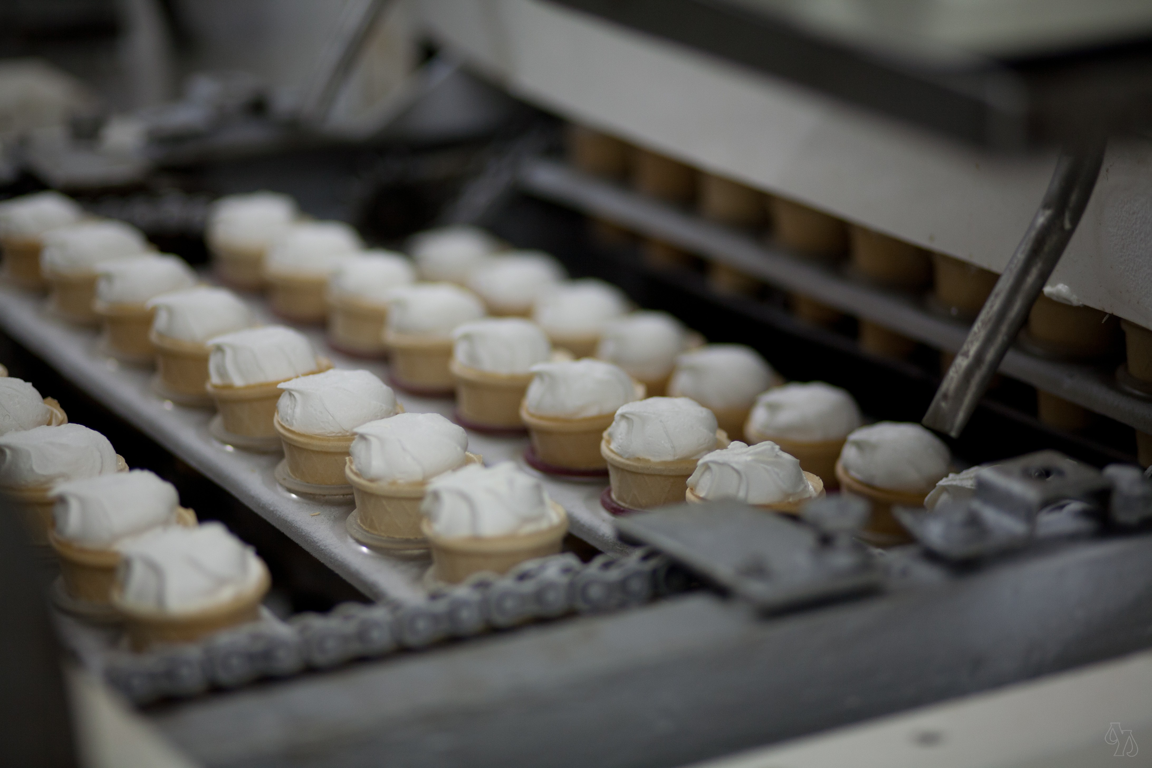 Мороженое пломбир, который производится на бережно сохраненном советском оборудовании